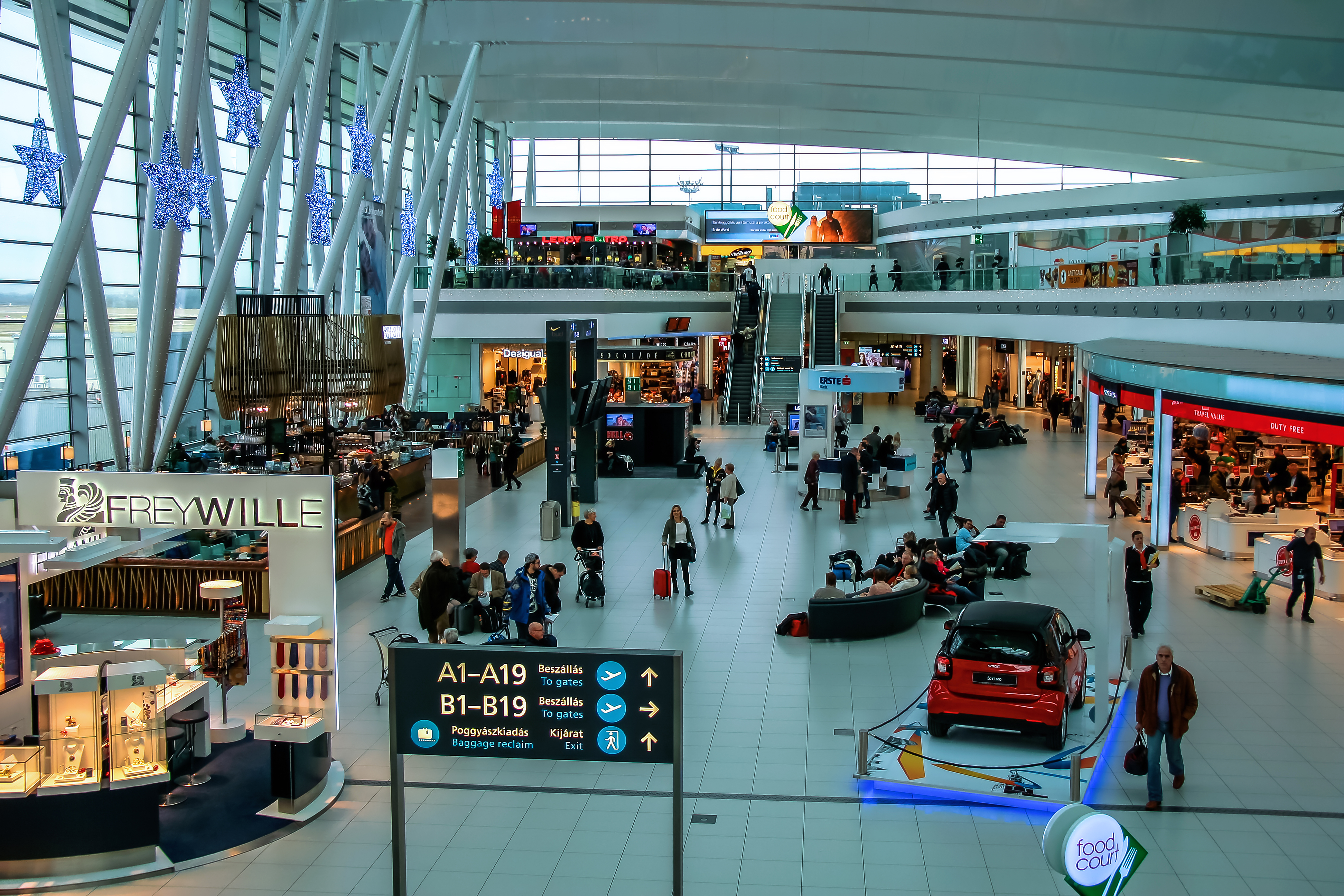 Budapest (Hungary)